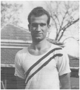 Dimitrije Cvetkovic